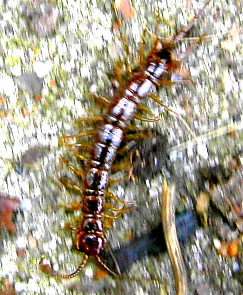 Chilopoda